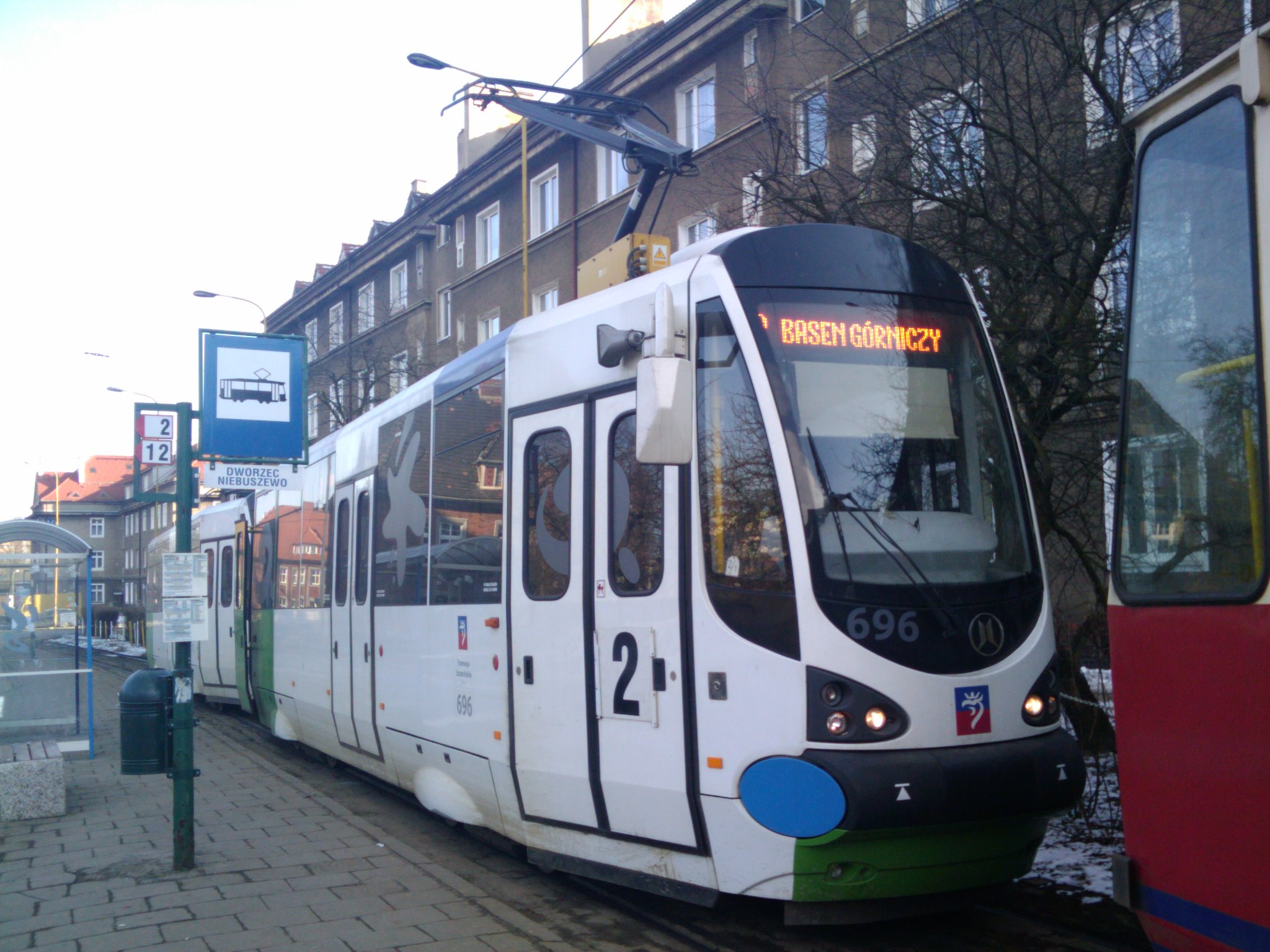 Tramwaj Moderus Alfa w Szczecinie